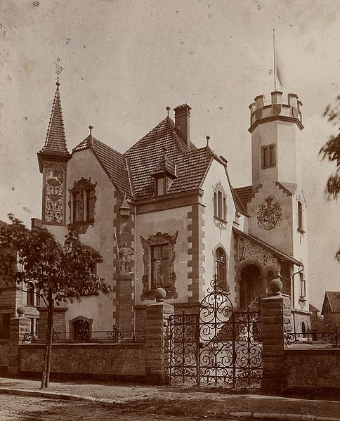 Corpshaus des Corps Hannovera Göttingen ca. 1898